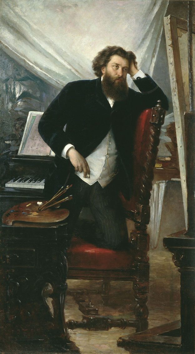 Фёдор Буров. Портрет художника К. Н. Воронова, холст, масло